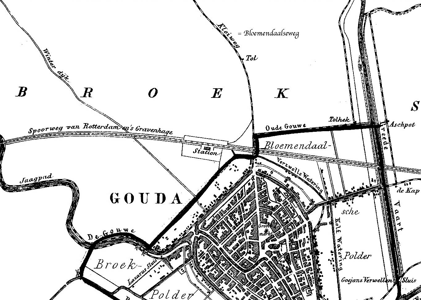 Fragment (Gouda en Bloemendaal) van een kaart van Gouda